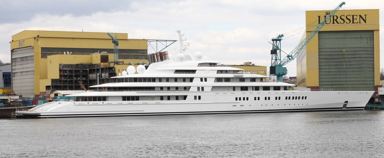 Azzam at Lürssen shipyard